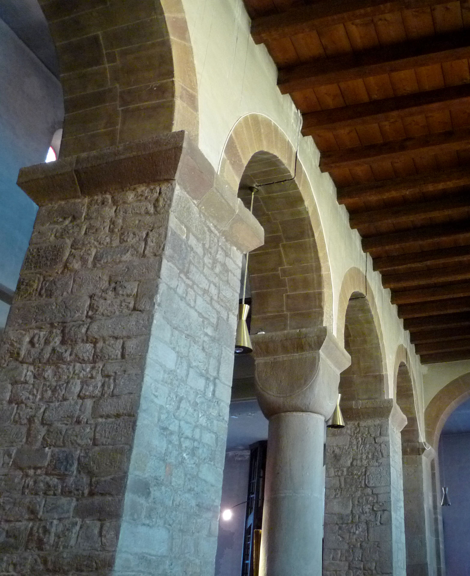 Alternance de piles et de colonnes à l'ancienne abbatiale de Surbourg (Bas-Rhin)